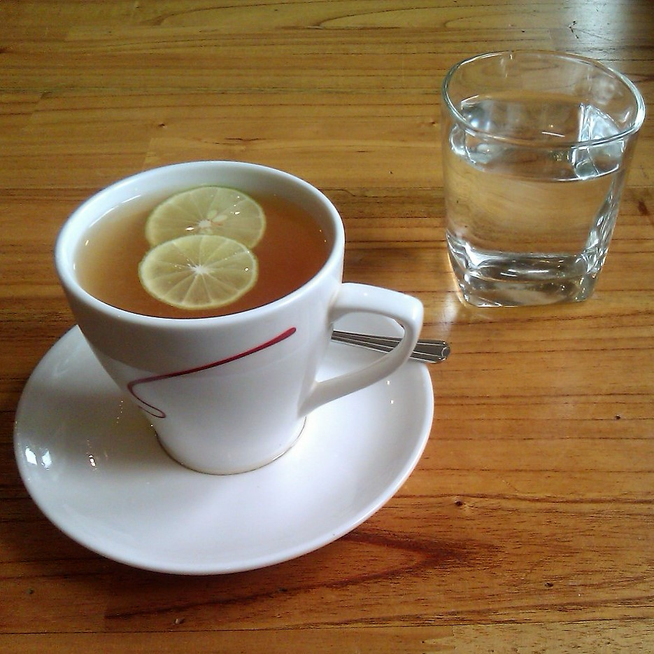 Tasse Tee mit Zitronenscheiben und einem Glas Wasser.